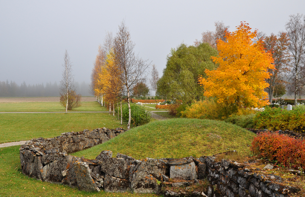 En av gravhögarna vid Frösö kyrka i Östersunds kommun, Jämtlands län.